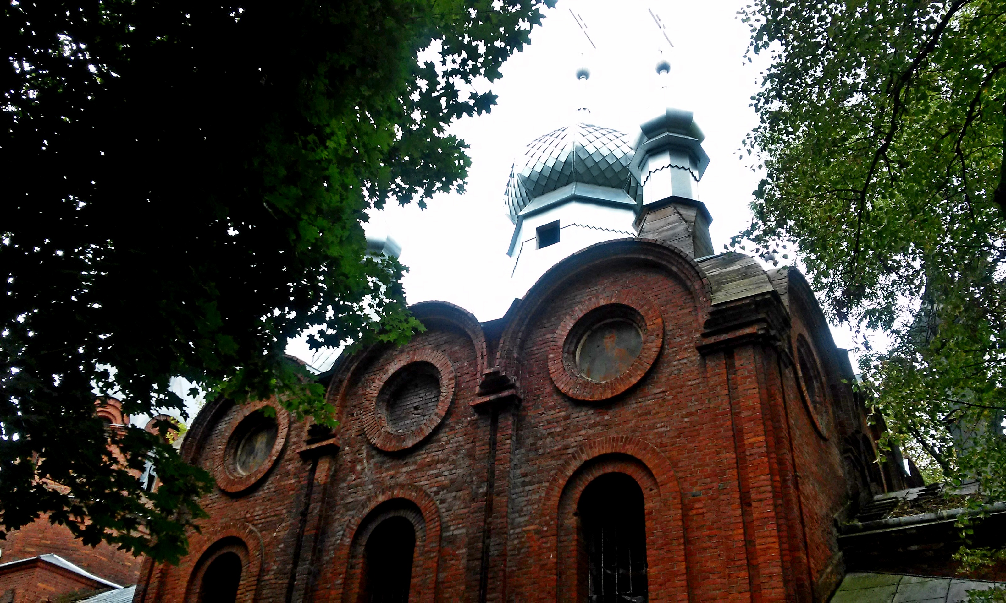 Cerkiew w Dubience. Widoczne ślady zniszczonych fresków z postaciami świętych